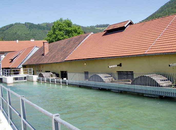 Sensenmuseum Geyerhammer - Fluderanlage mit Wasserrädern